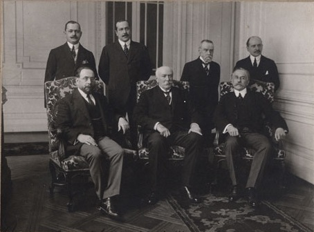 Decimo primer gabinete de Juan Luis Sanfuentes